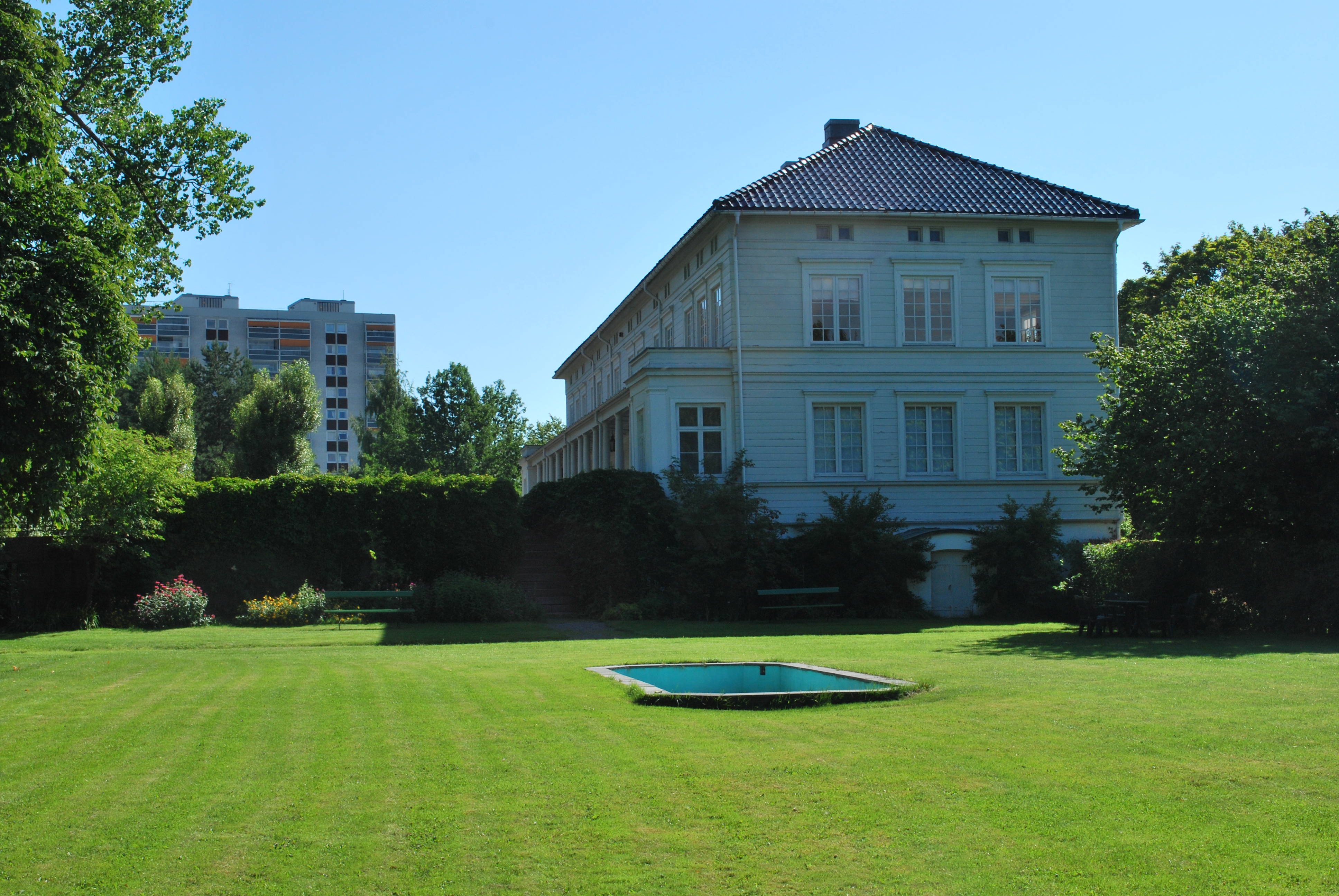 Norsk (bokmål): Linderud gård, Oslo, hovedbygningen sett fra vest